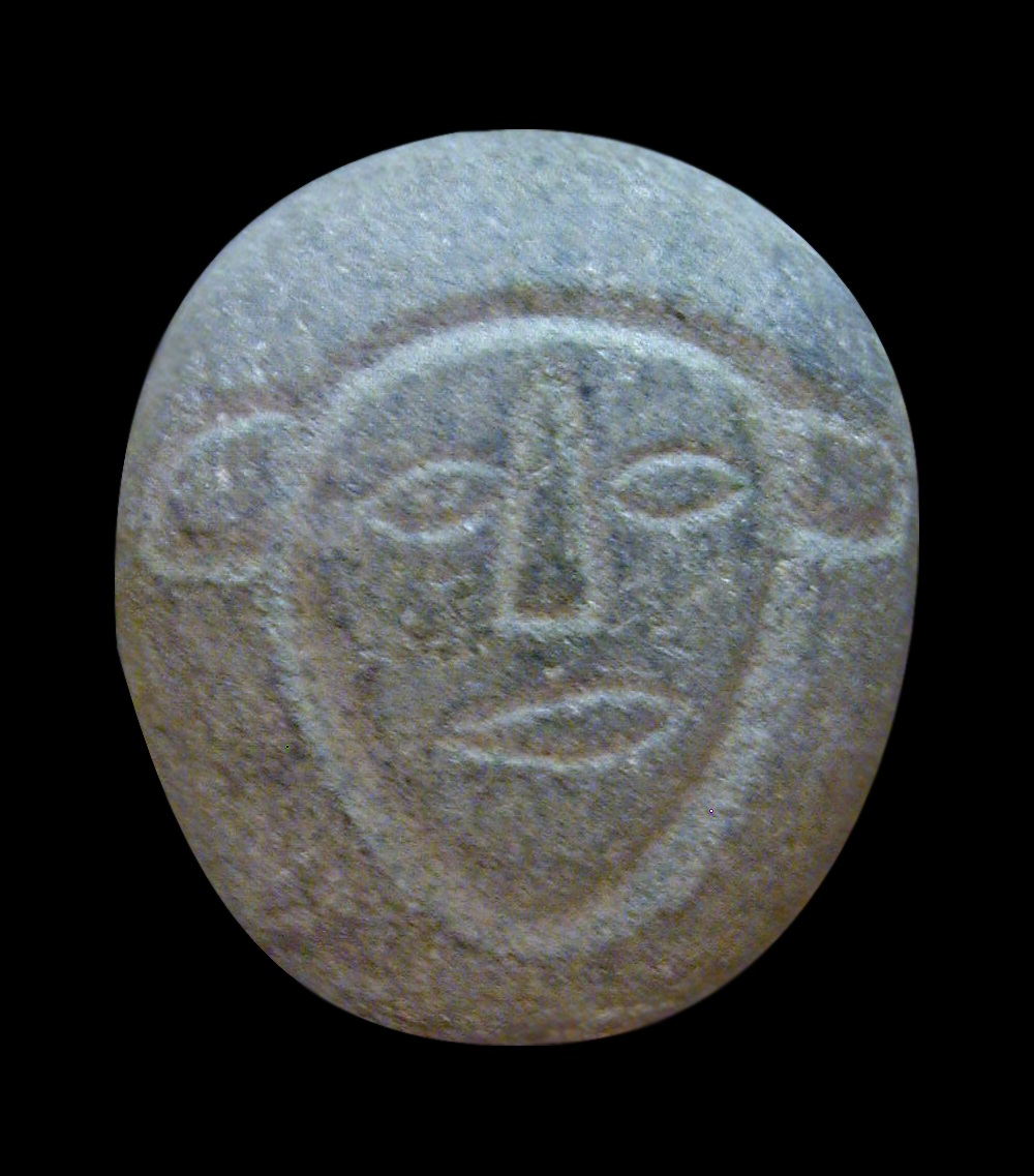 Galet de granit avec figure de divinité, Carthage, Ve siècle av. J.-C.